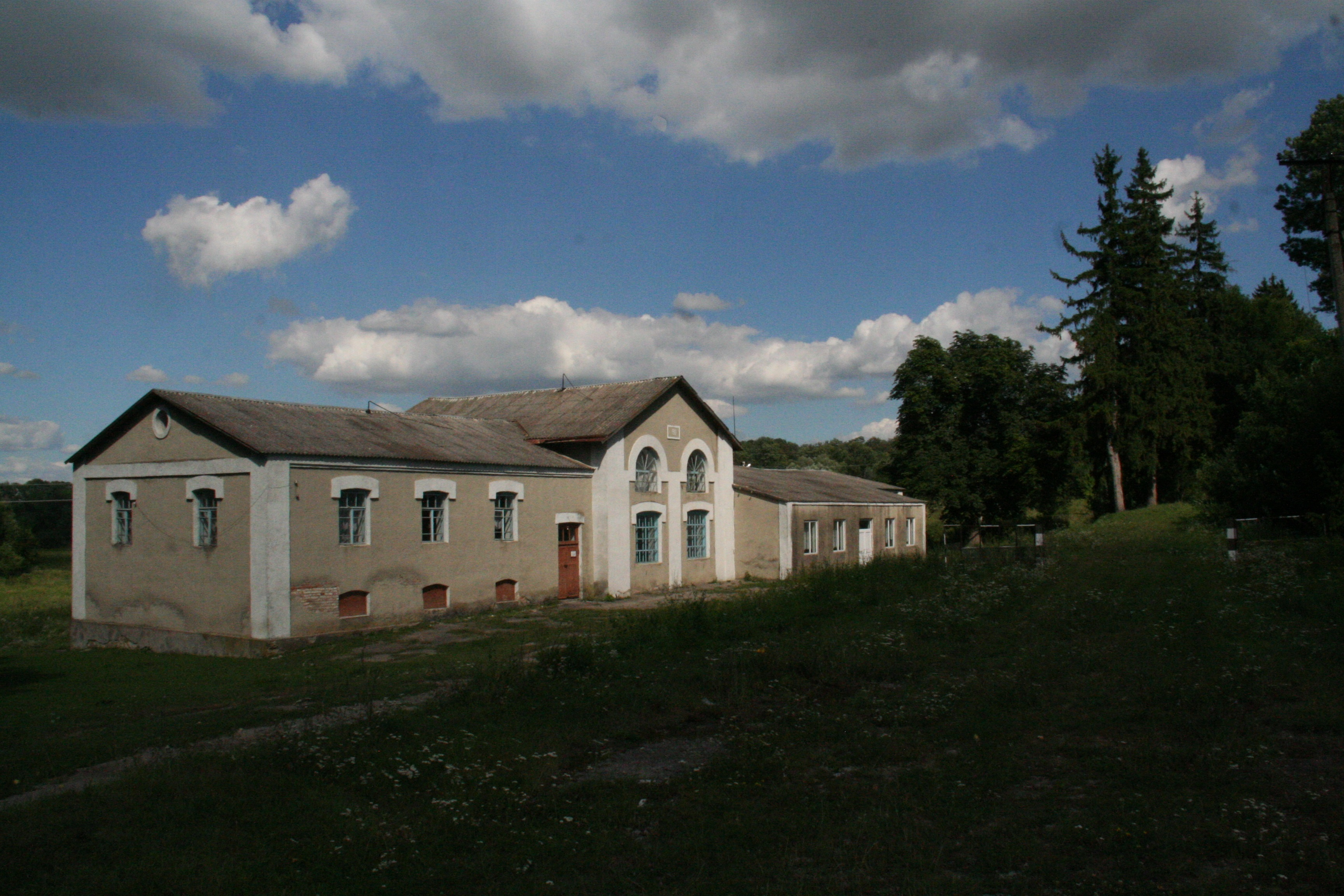 Будівля бувшої гуральні в с.Баламутівка Ярмолинецького району Хмельницької обл.